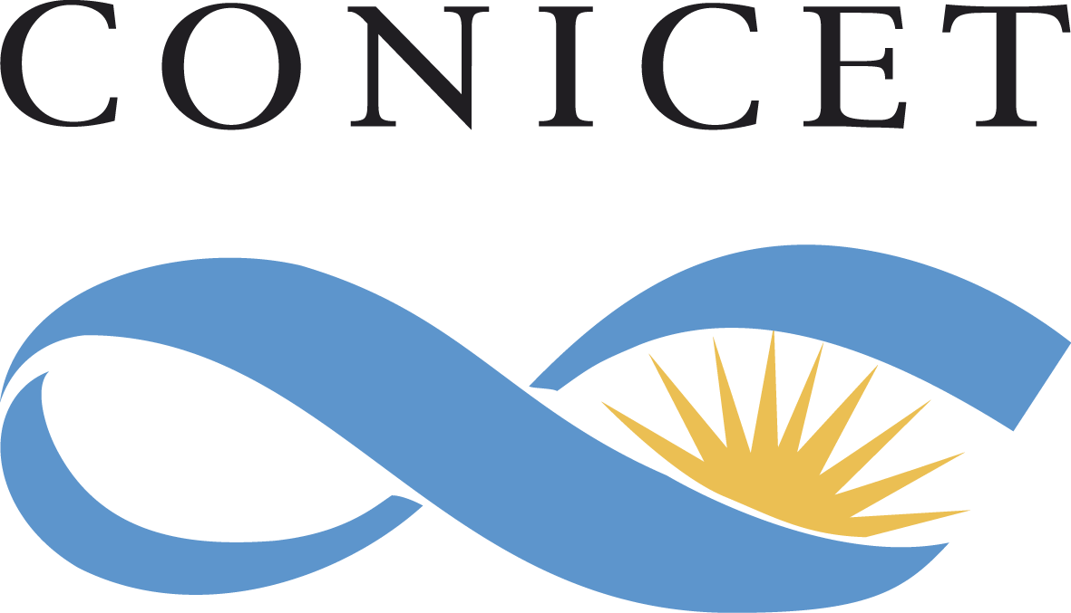 Conicet Logo con letras